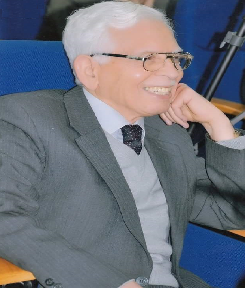 الدكتور طارق الجنابي